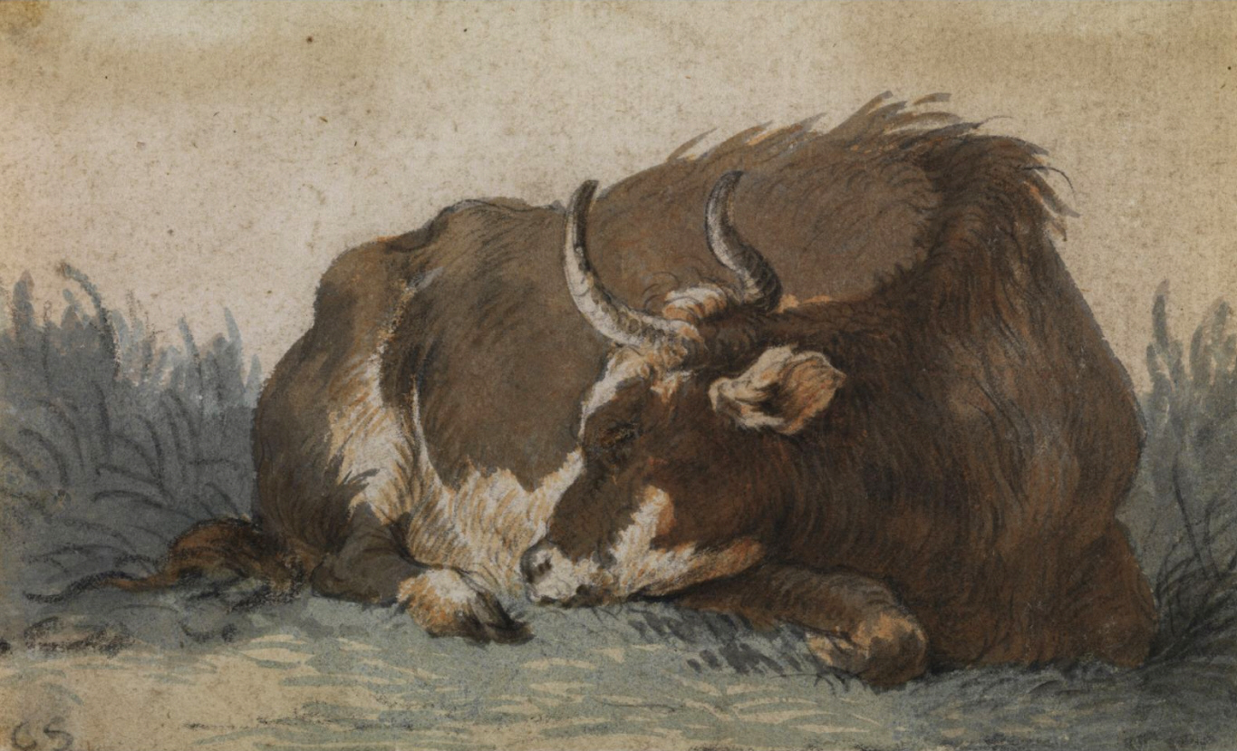 Liegende Kuh, Gouache auf Büttenpapier, 8,5 x 14 cm.